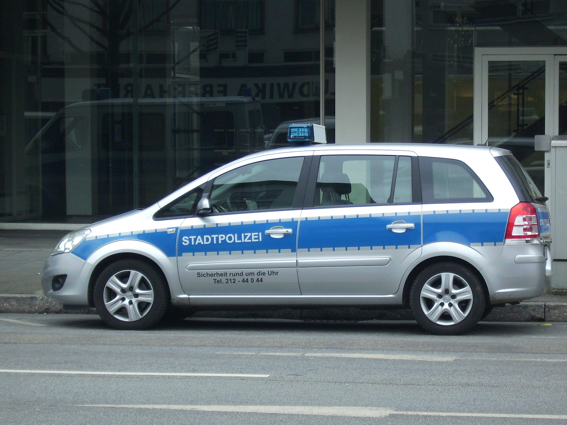 Ein Fahrzeug der Stadtpolizei in der Innenstadt von Frankfurt.